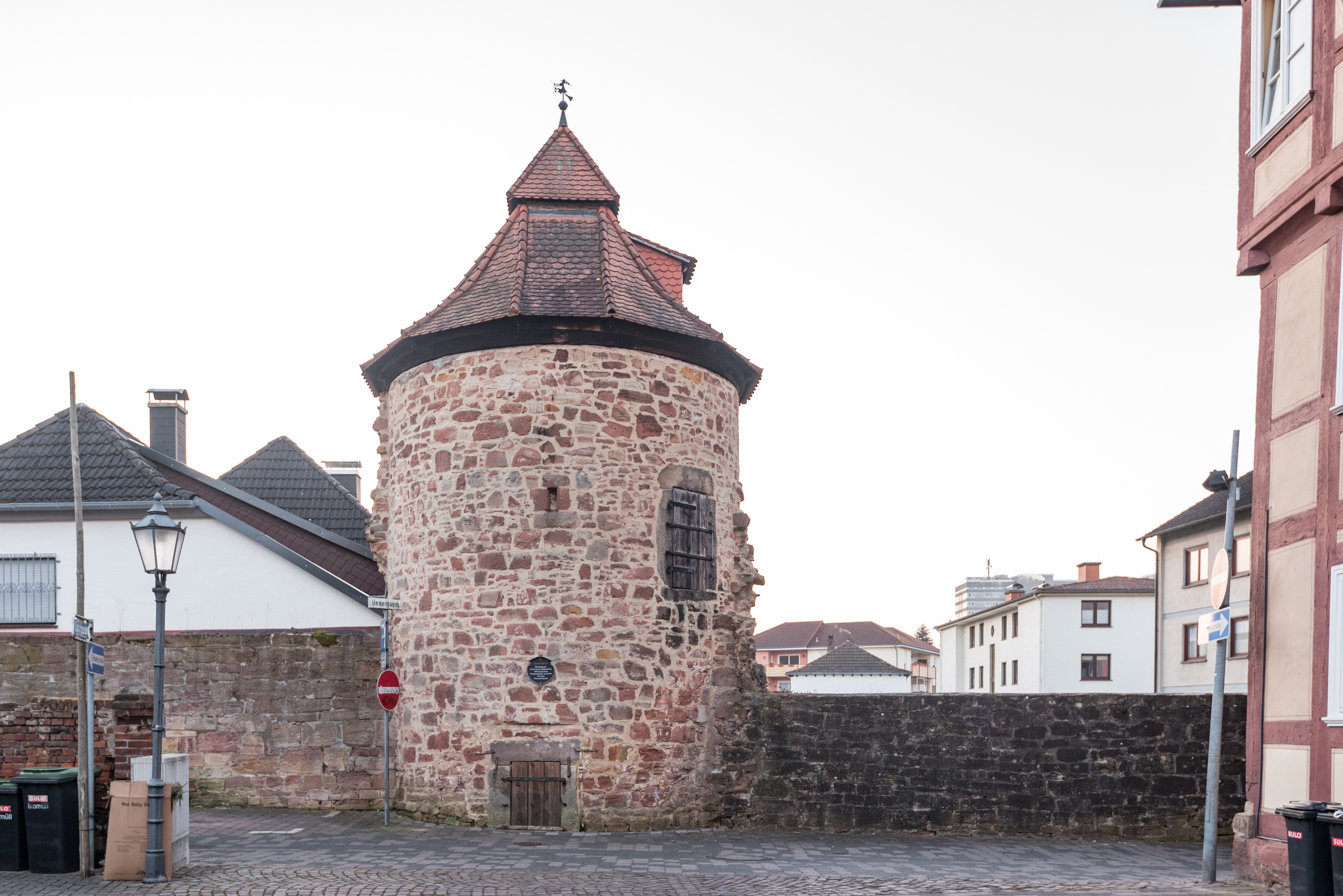 Rotenburg an der Fulda, Am Hexenturm, Hexenturm